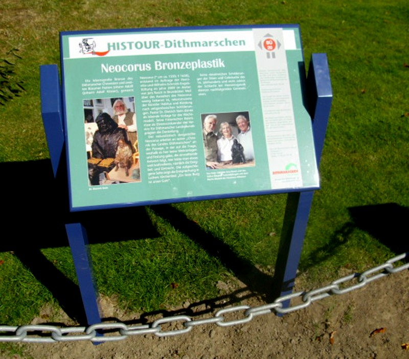 Histour-Tafel mit Informationen zur Neocorus-Bronze in Büsum